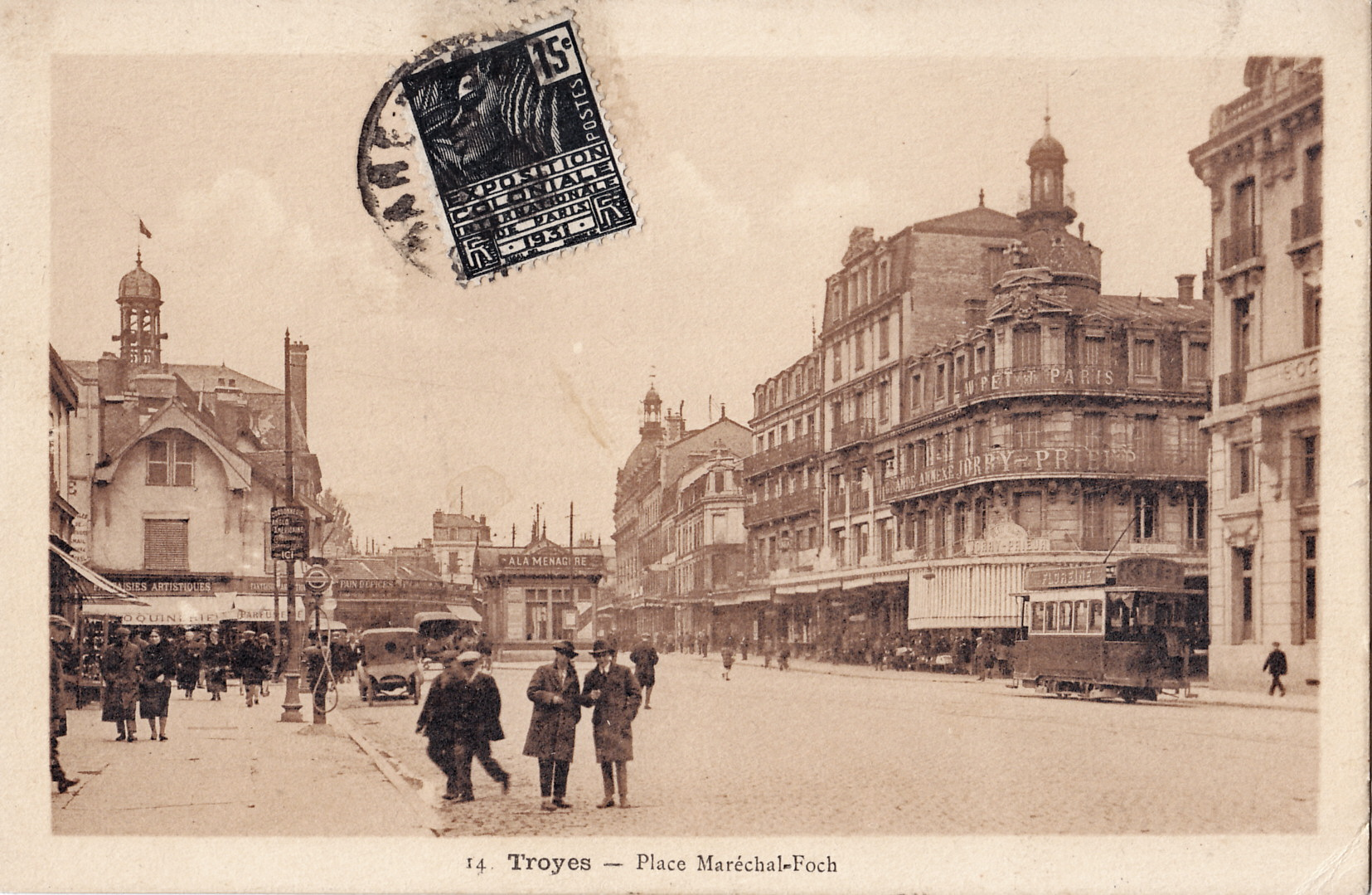 Carte postale ancienne éditée par Mignot, n°14:TROYES - Place Maréchal-Foch